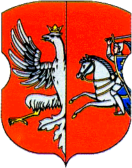 Herb miasteczka Kołki